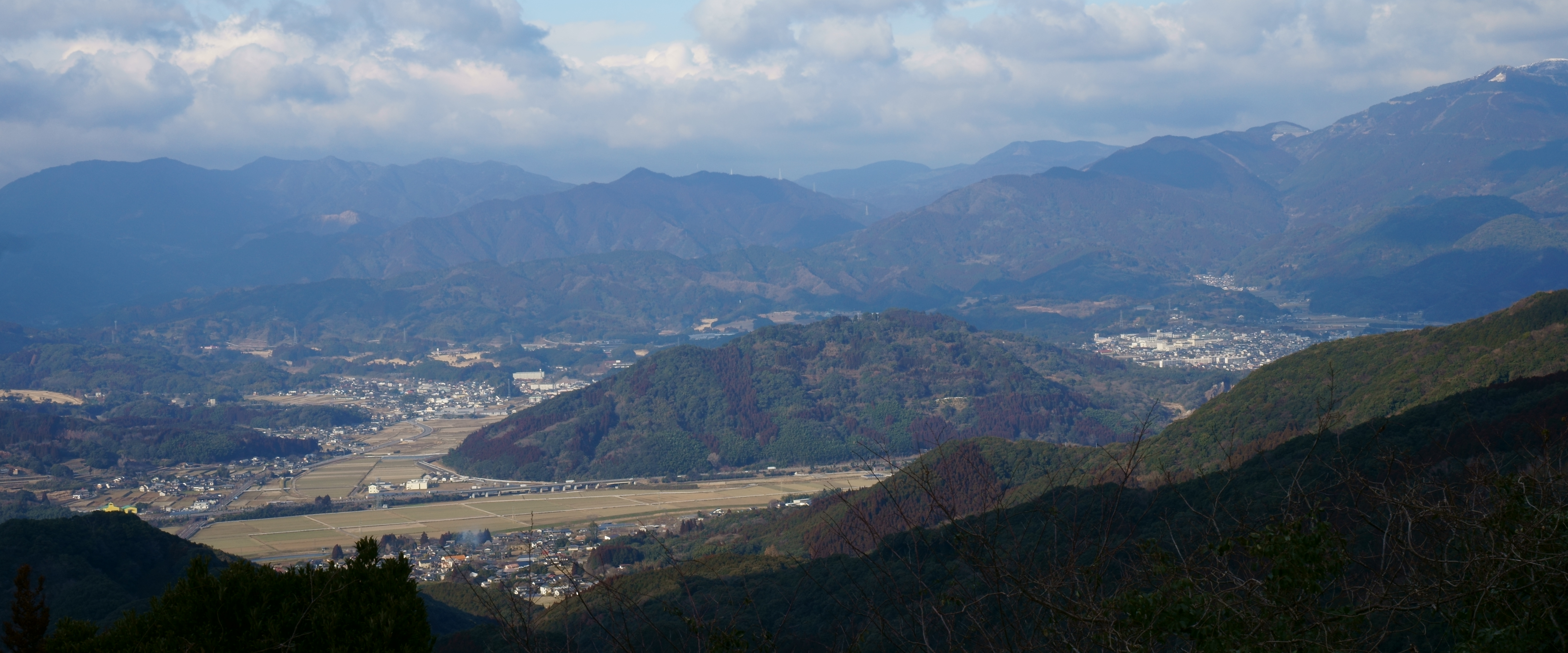 佐賀県の多久盆地（多久市街）。鬼の鼻山北側駐車場そばの展望台から。